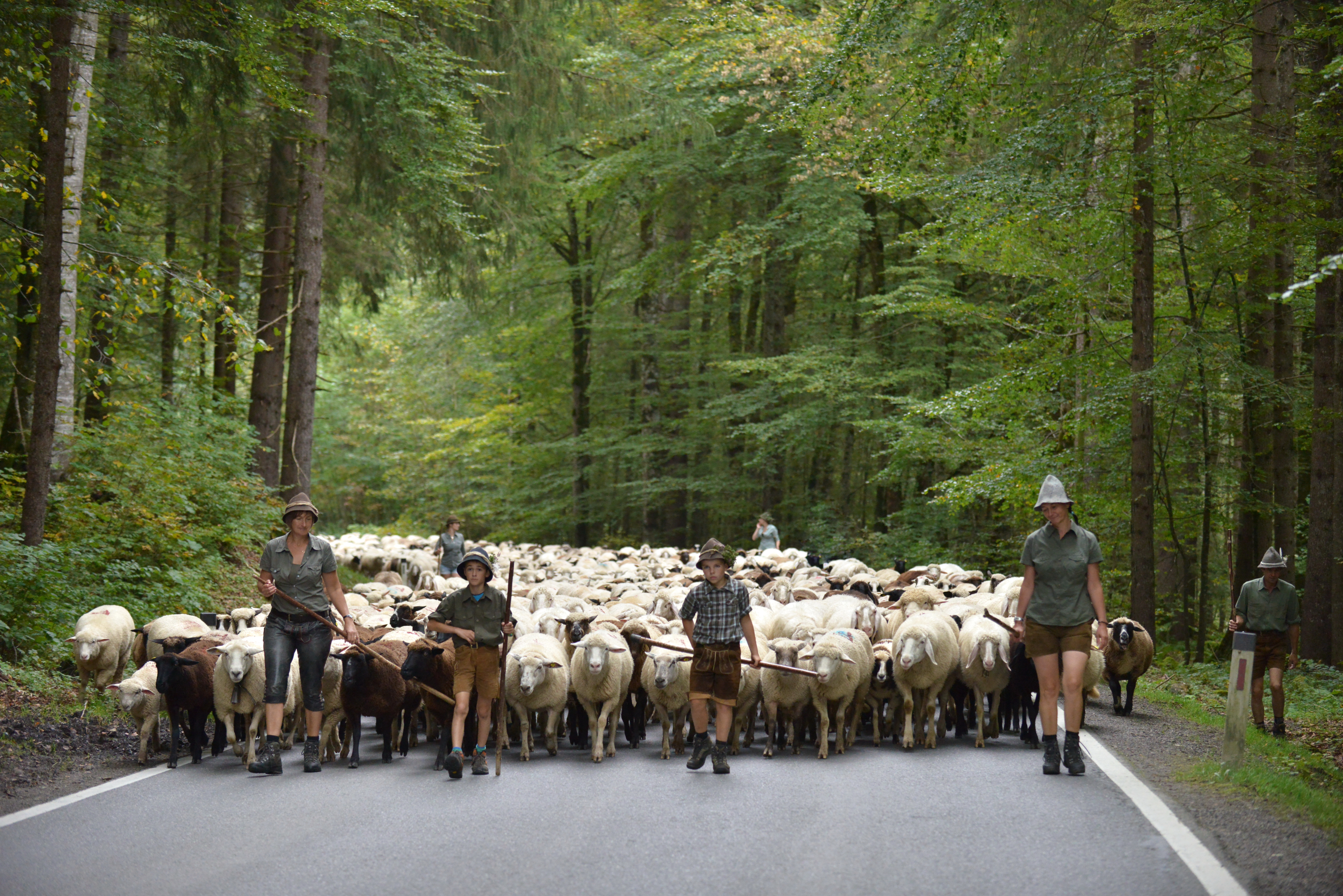 2014, Almabtrieb der Schafe von Schröcken nach Schoppernau im Bregenzerwald Dieses Highlight wird mit dem “Veahmätle” (kleiner Viehmarkt) gefeiert.